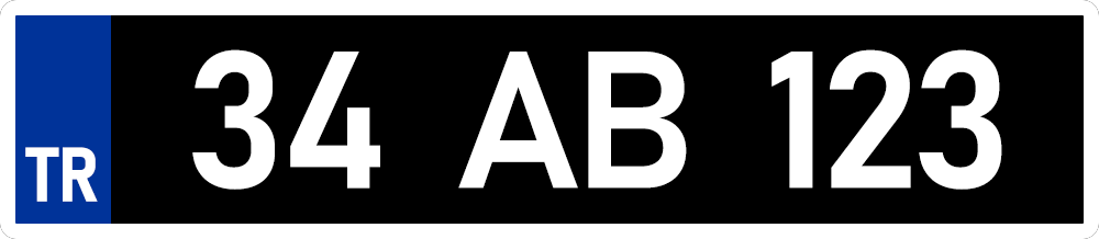 نمونه پلاک ترکیه